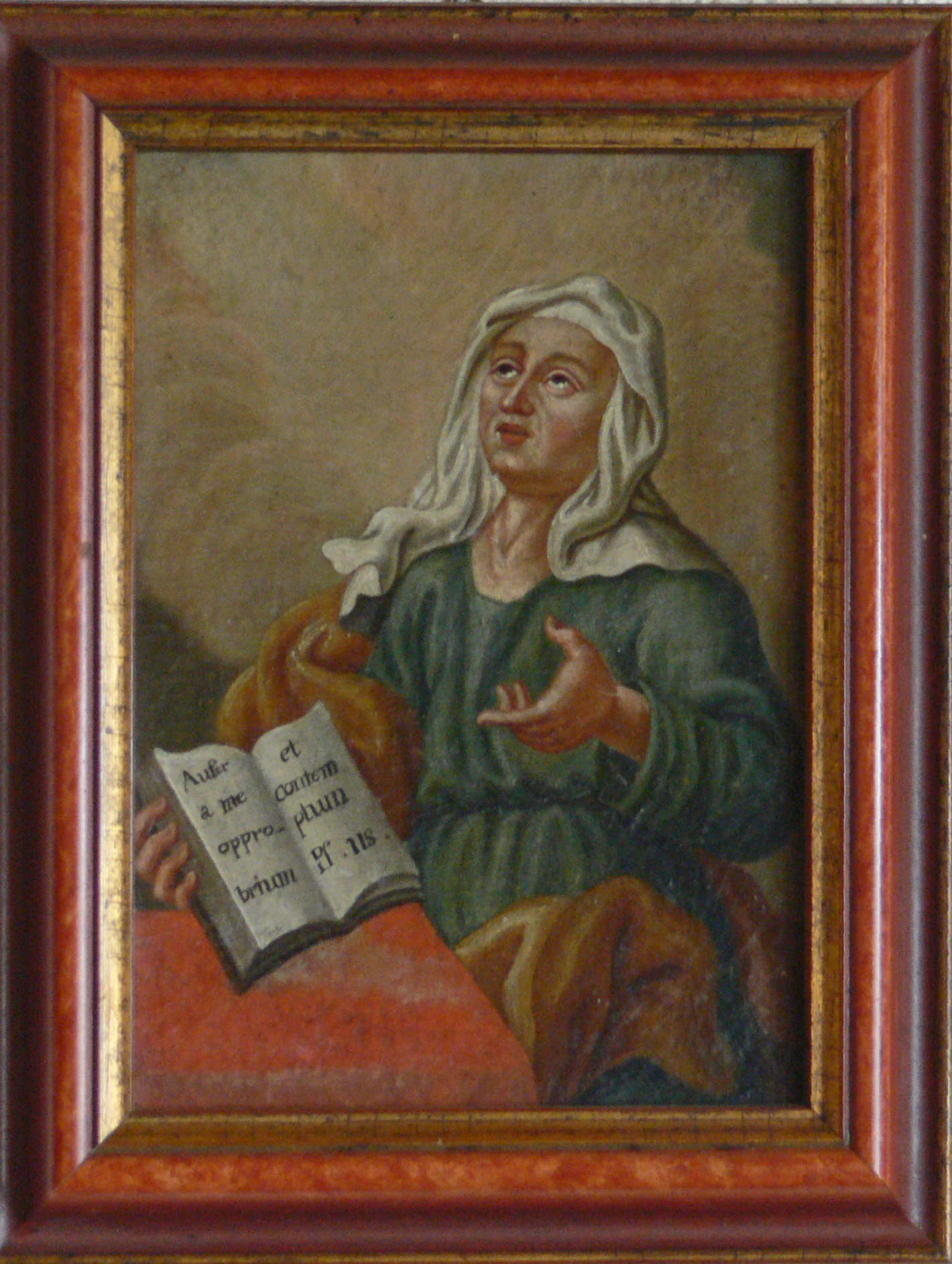 Hinterglasbild Psalm 119, 22 (Text) Hammerhof, Deggenhausertal